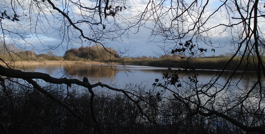 Der Peper See bei Süsel